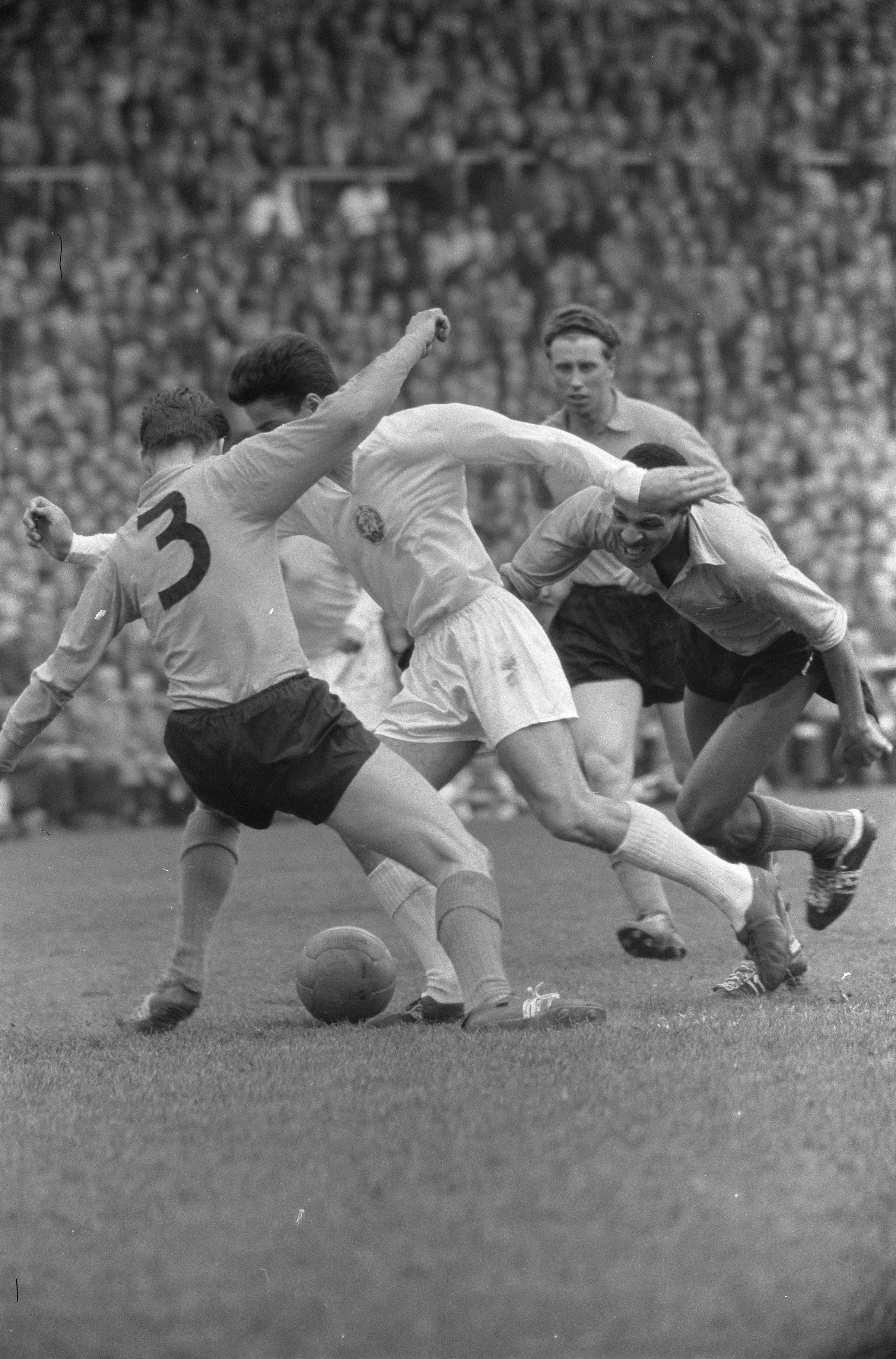 Collectie / Archief : Fotocollectie Anefo Reportage / Serie : [ onbekend ] Beschrijving : Nederland tegen Bulgarije 4-2 in het Olympisch Stadion spelmoment voor Nederland doel, Kuys, Mijnals en Jan Klaassens in actie Datum : 3 april 1960 Locatie : Bulgarije, Nederland Trefwoorden : doelen Persoonsnaam : Klaassens Instellingsnaam : Olympisch Stadion Fotograaf : Pot, Harry / Anefo Auteursrechthebbende : Nationaal Archief Materiaalsoort : Negatief (zwart/wit) Nummer archiefinventaris : bekijk toegang 2.24.01.05 Bestanddeelnummer : 911-1439